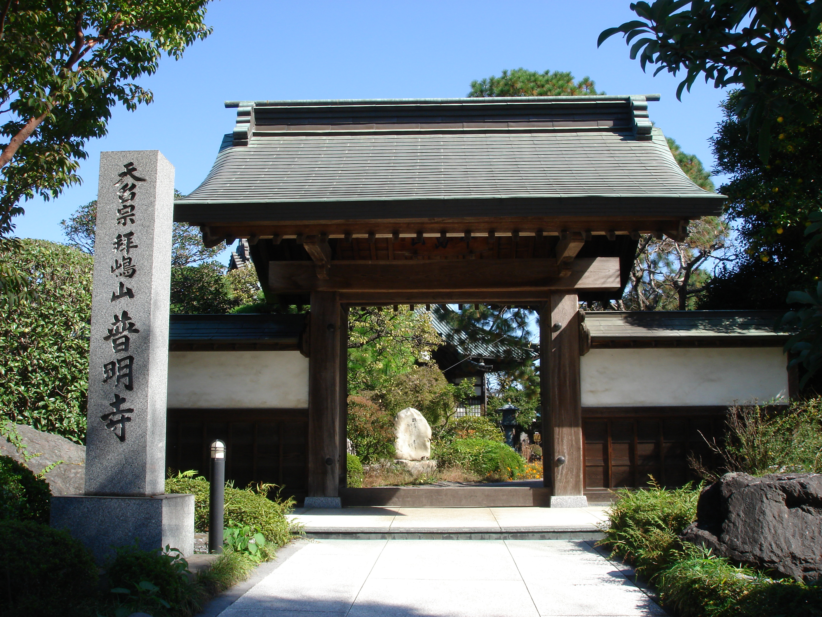 山門